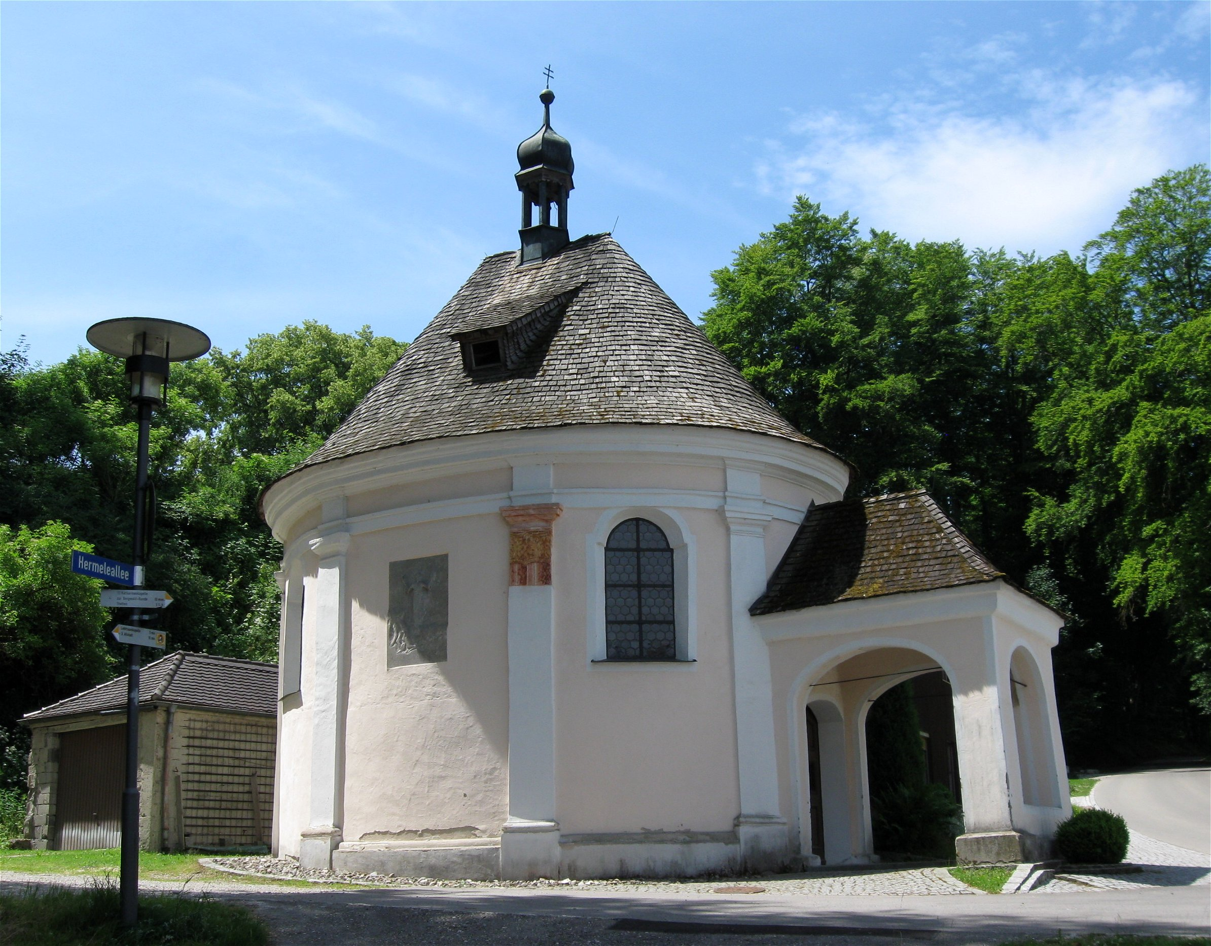 Memminger Straße 39; Katholische Herrgottsruhkapelle, pilastergegliederter Zentralbau über längsovalem Grundriss mit Dachreiter und nördlichem Vorbau, 1718; mit Ausstattung; Lindenallee, 1723